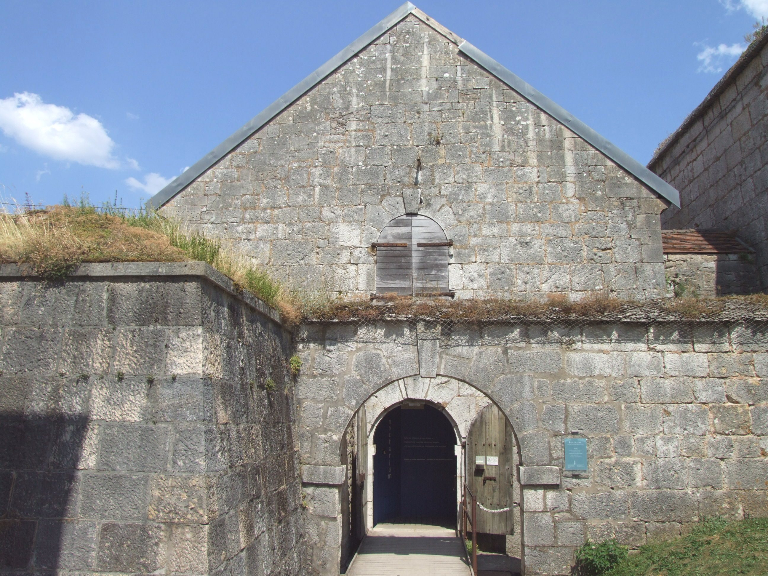 Citadelle de Besançon - Le magasin à poudre